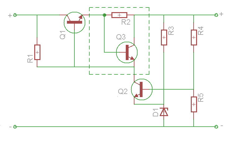 Transistoriga kaitselülitus